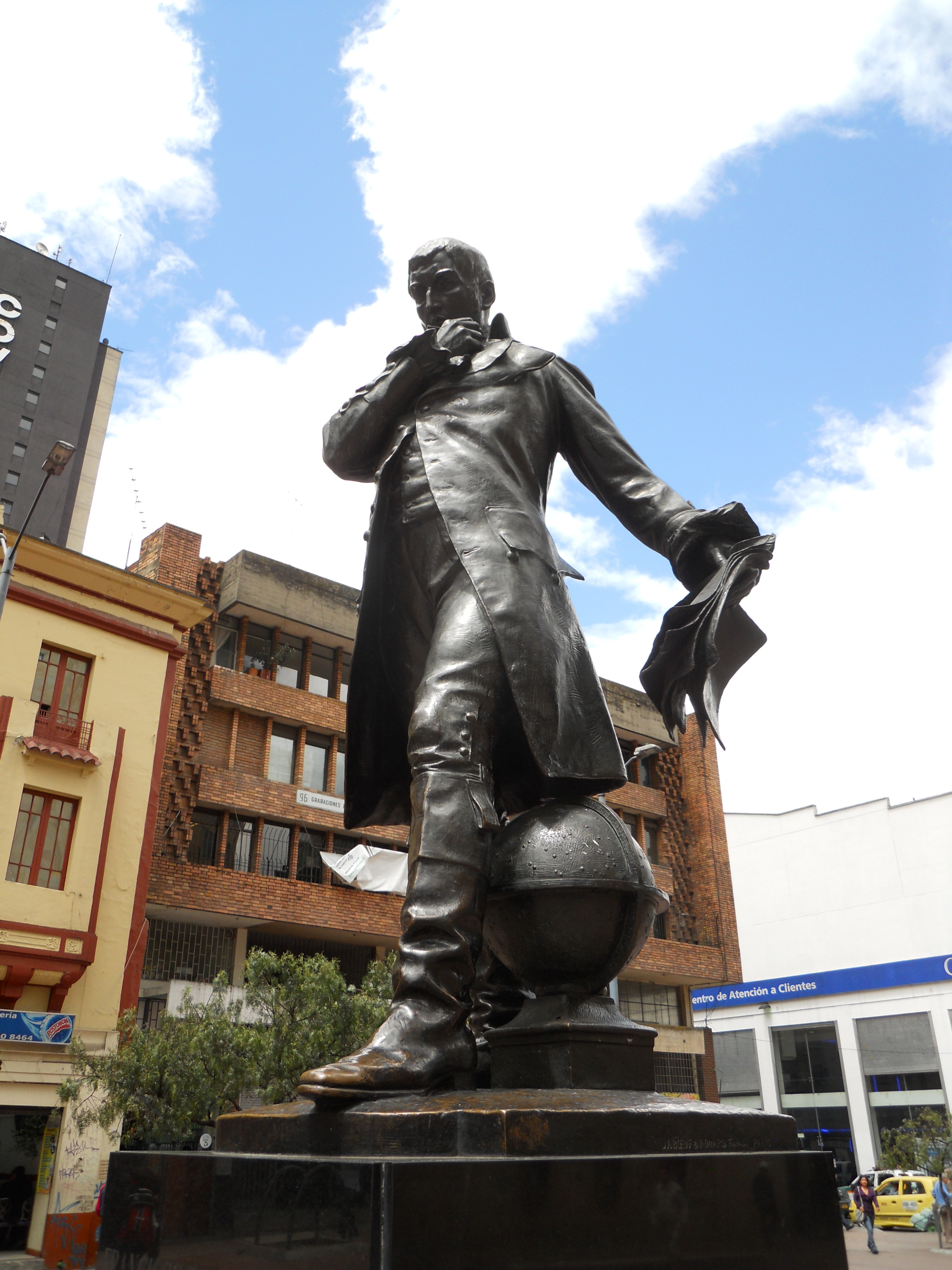 Escultura de Francisco José de Caldas en la plazoleta de Las Nieves en la localidad de Santa Fe en el centro de Bogotá. Carrera Séptima con calle Veinte.